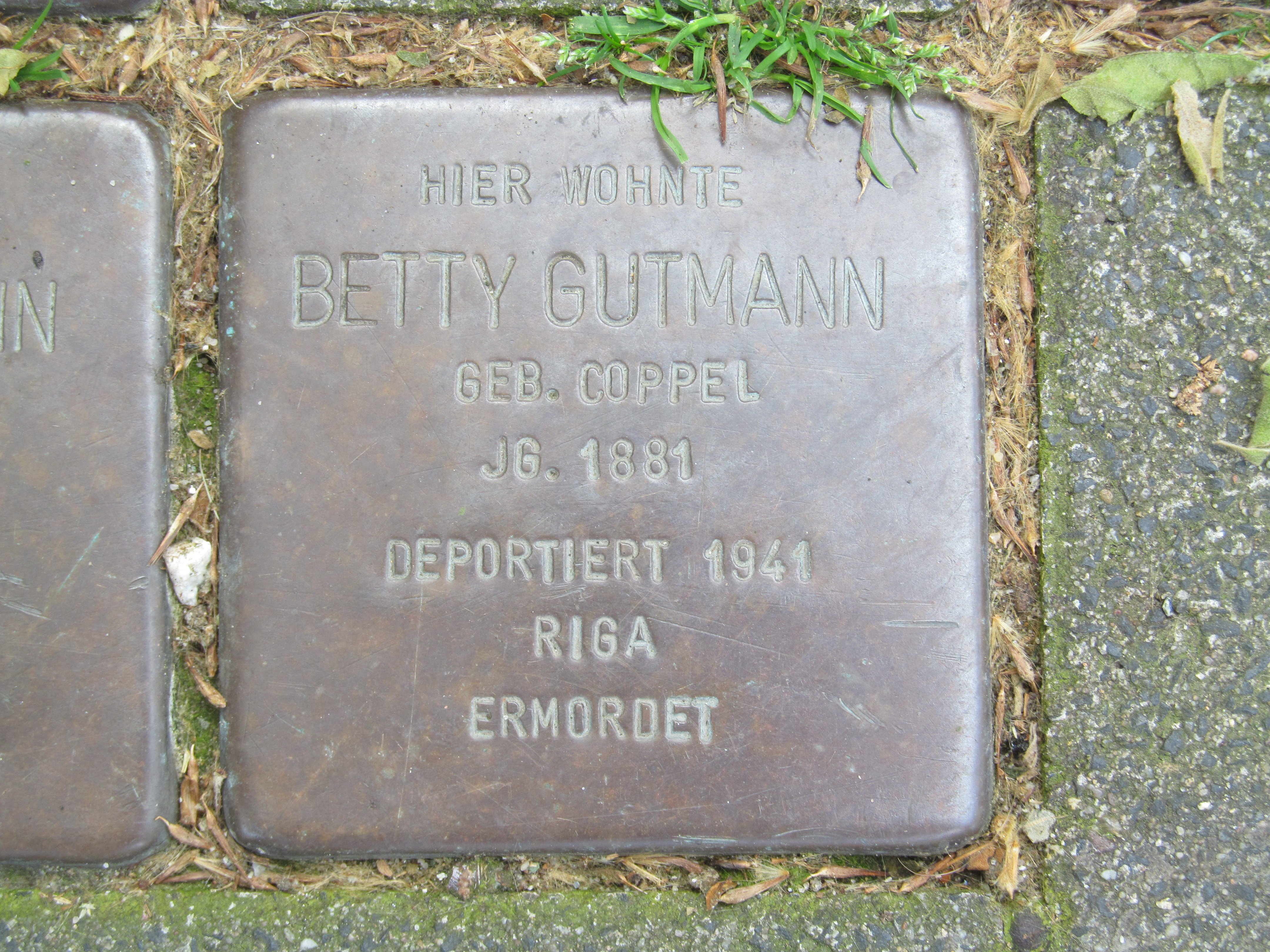 der Stolperstein für Betty Gutmann vor dem Haus Rheinstraße 27 in Duisburg-Homberg